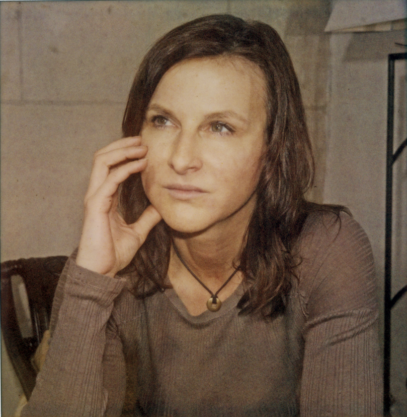 Zelfportret - Polaroid Carmen De Vos